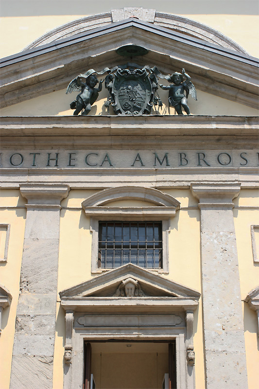 Particolare della facciata originaria della Biblioteca Ambrosiana di Milano su piazza San Sepolcro